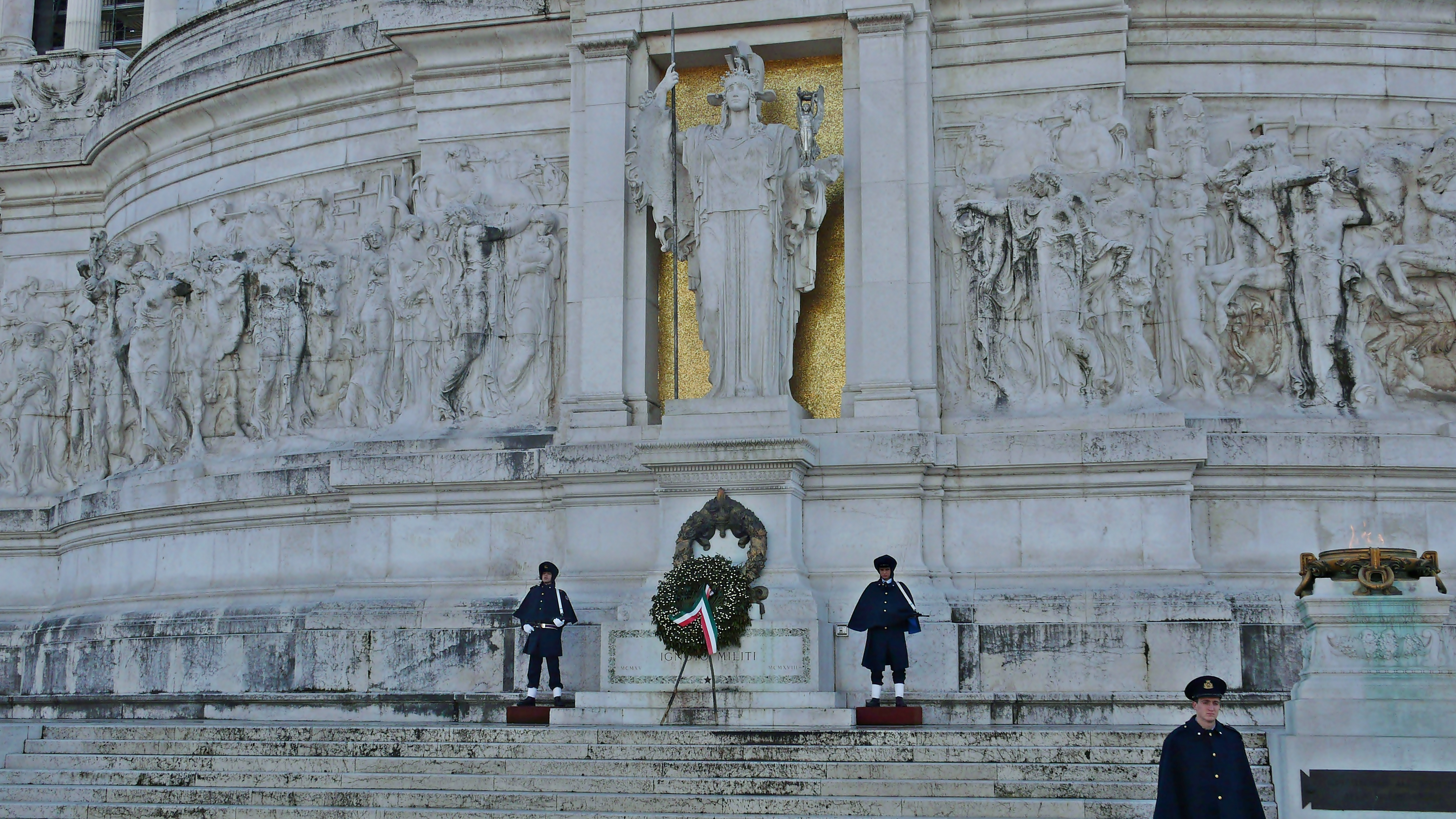 tumba al soldado desconocido-roma